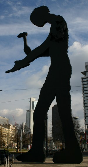 Working Man vor dem Frankfurter Messeturm